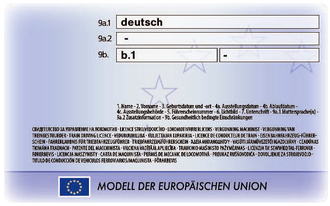 Gemeinschaftsmodell für den Triebfahrzeugführerschein (Rückseite des Tfz-Führerscheins nach dem europaweit einheitlichen Muster, deutsche Version entsprechend TfV)